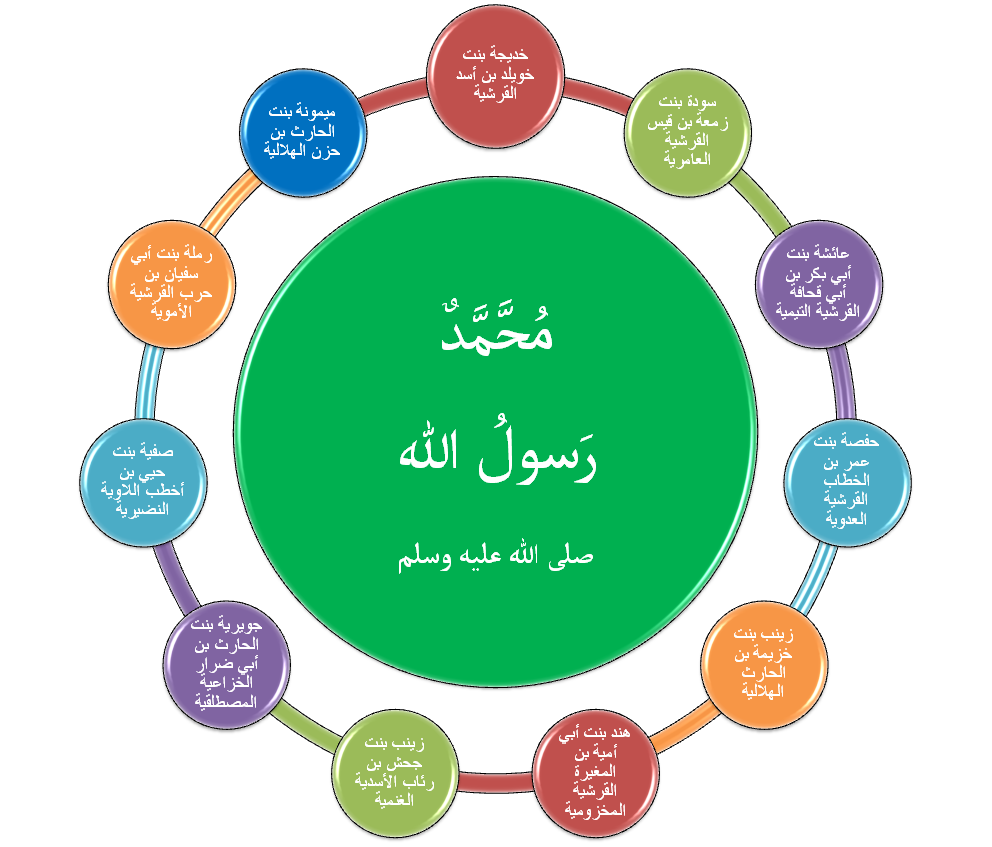 عملي الشخصي ، قمت برسمه بنفسي